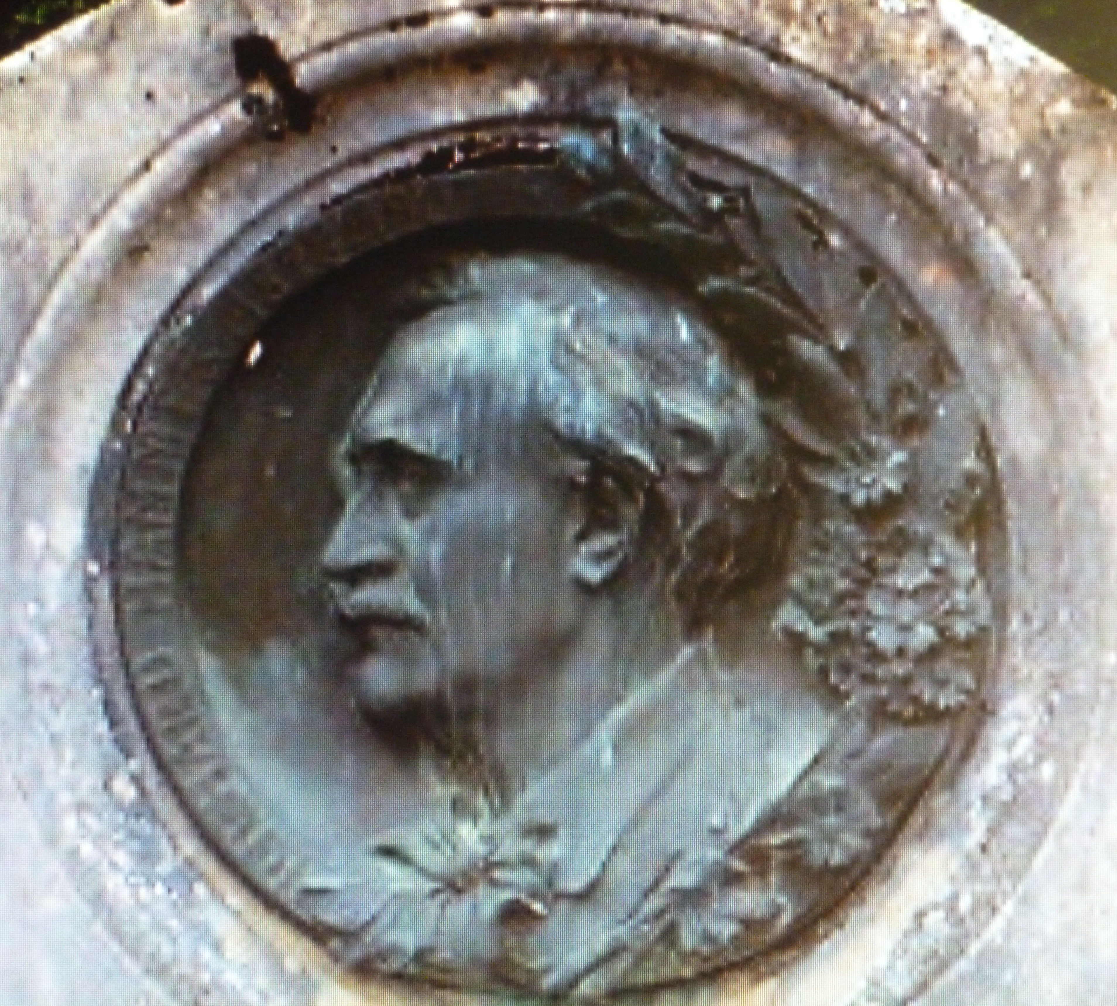 Stèle de Richard Hammer au cimetière de Chaux-des-Crotenay (Jura)